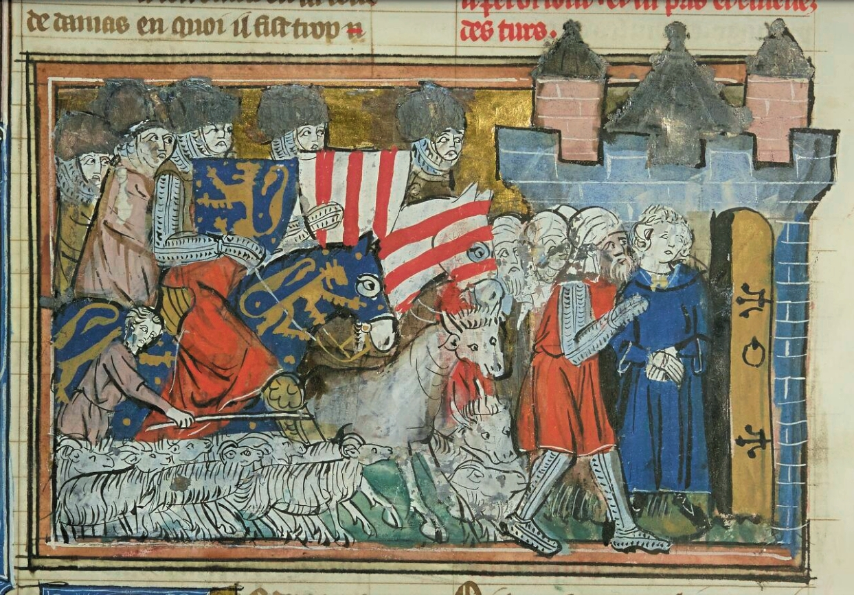 Renaud de Châtillon prisonnier